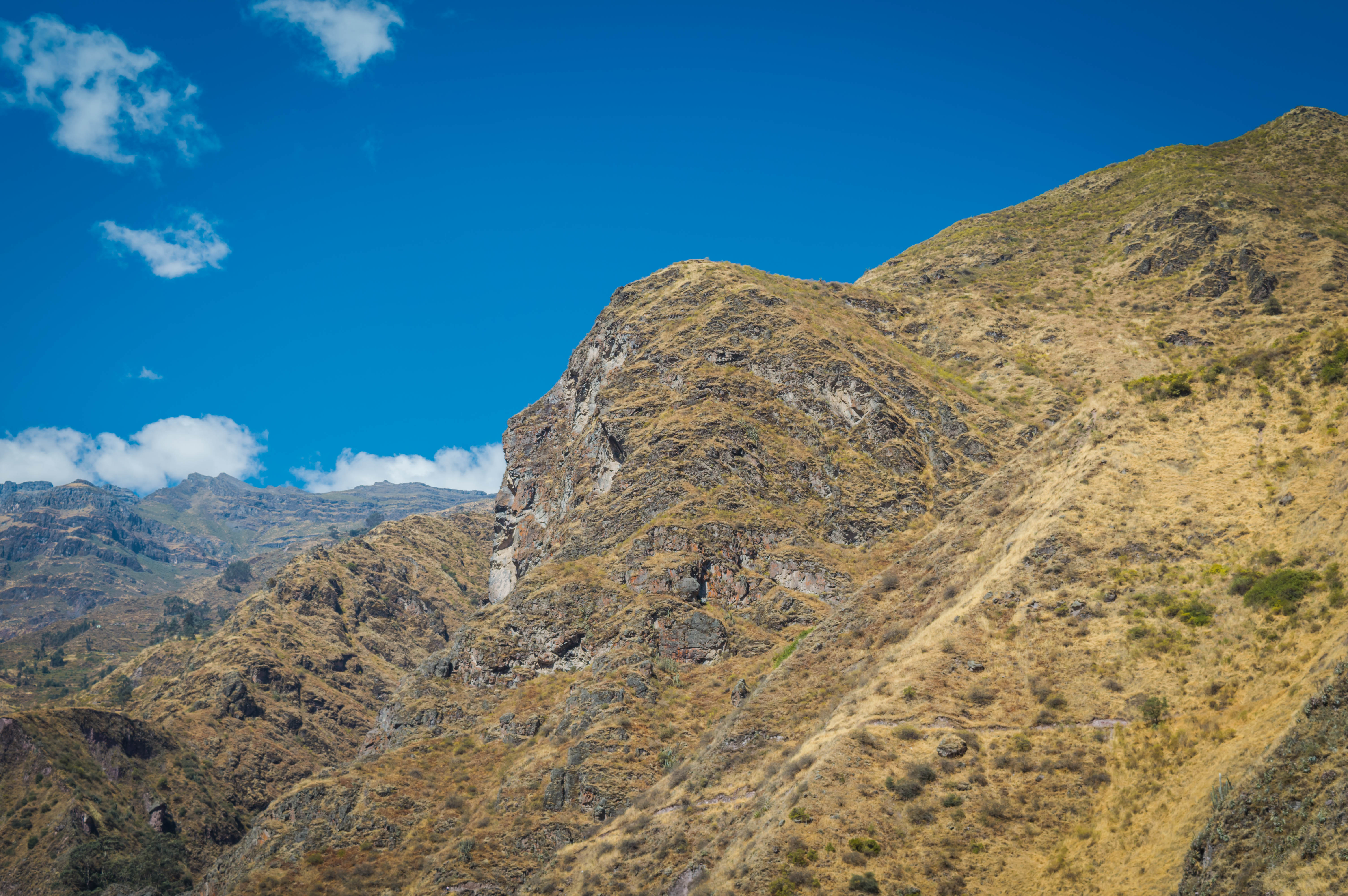 La montaña del León se encuentra poco antes de llegar a las cataratas de Antakallo